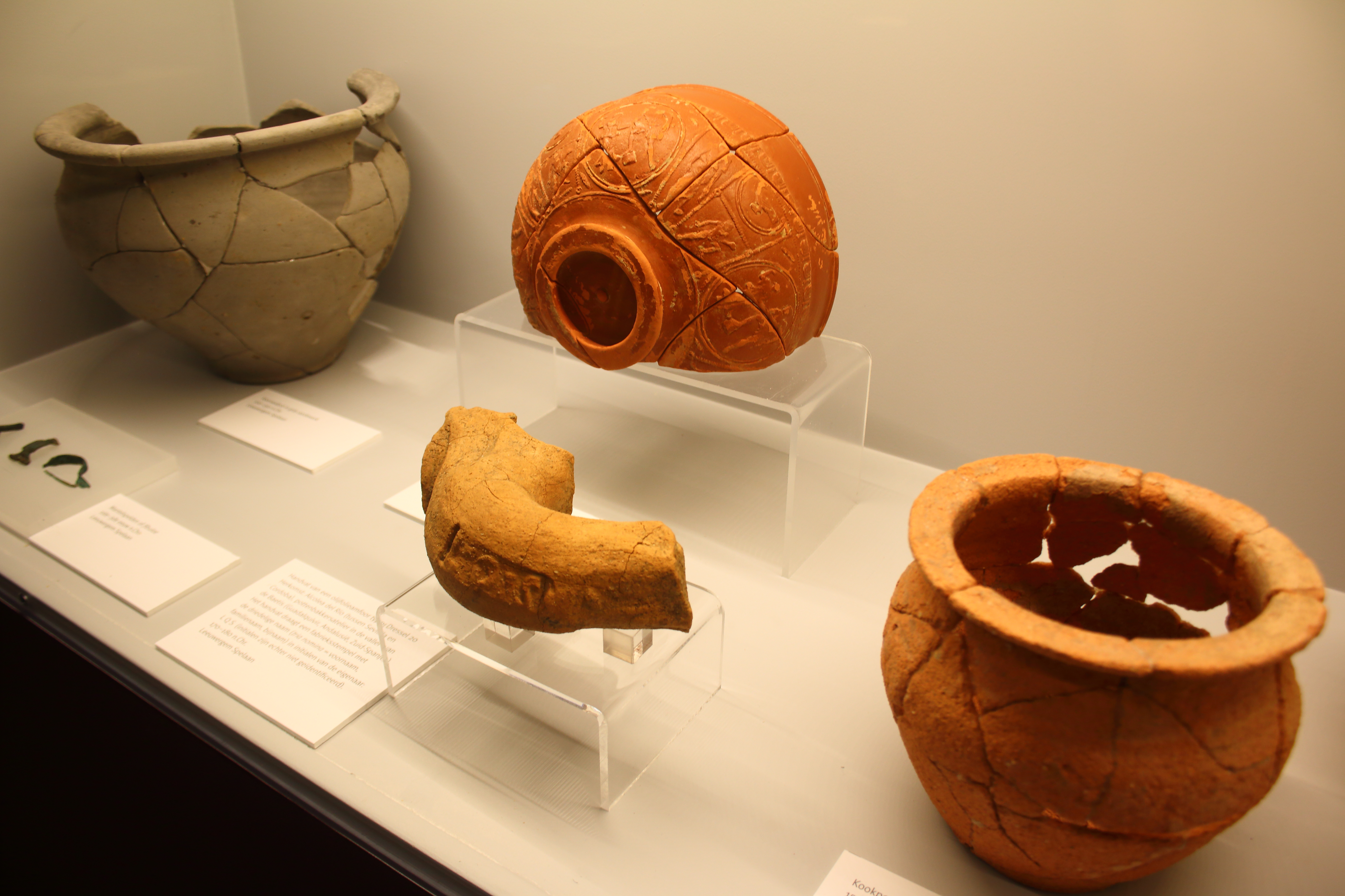 archeologische vondsten Spelaan Leeuwergem, (tijdelijke tentoonstelling 'Landschap doorgrond', Provinciaal Archeocentrum Velzeke)